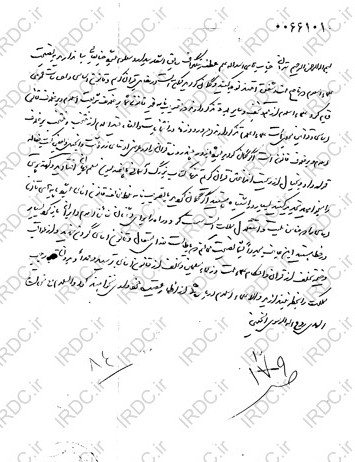 امام در تلگرافی دیگری به علم